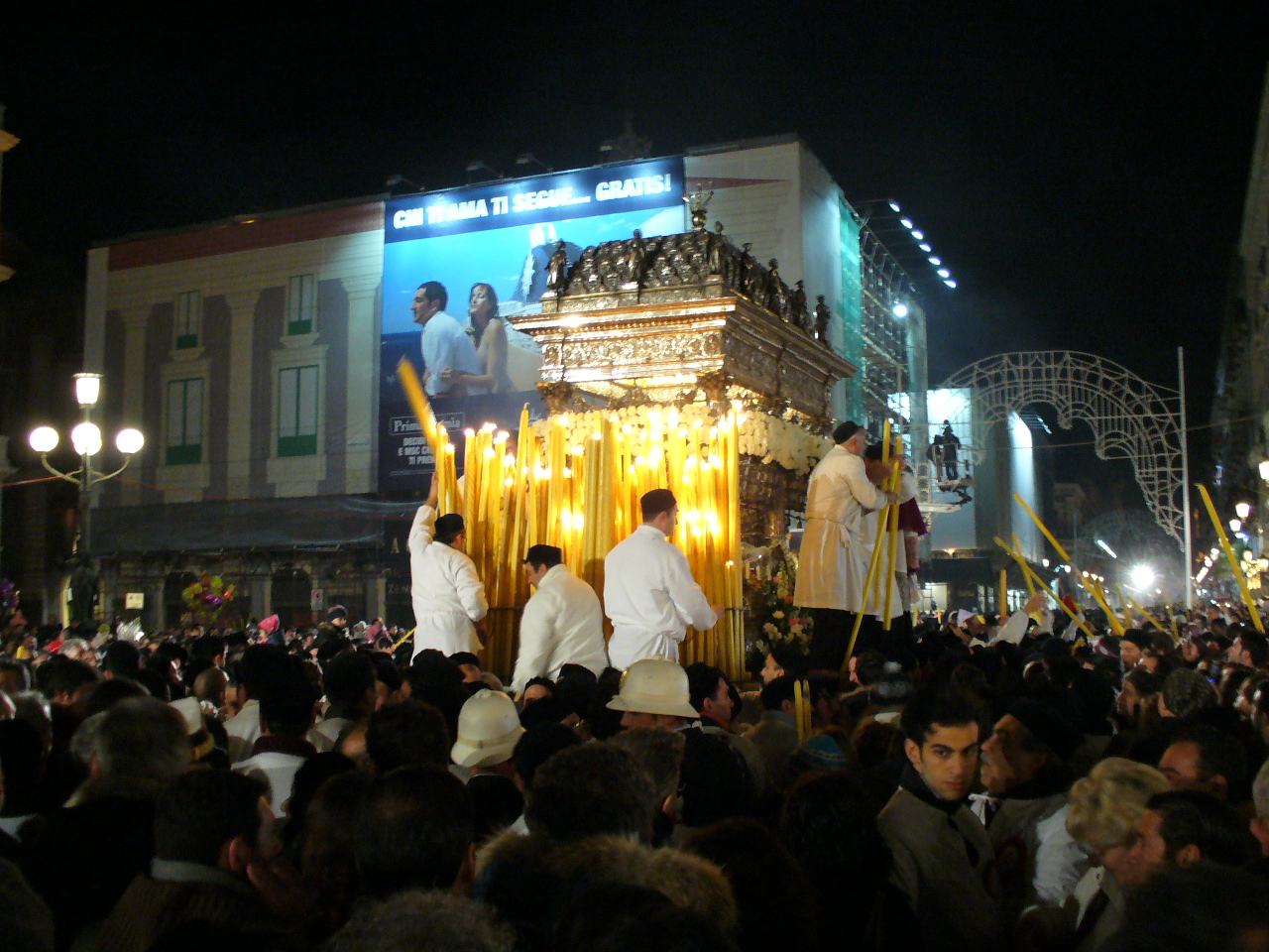 Procissão na Via Etnea